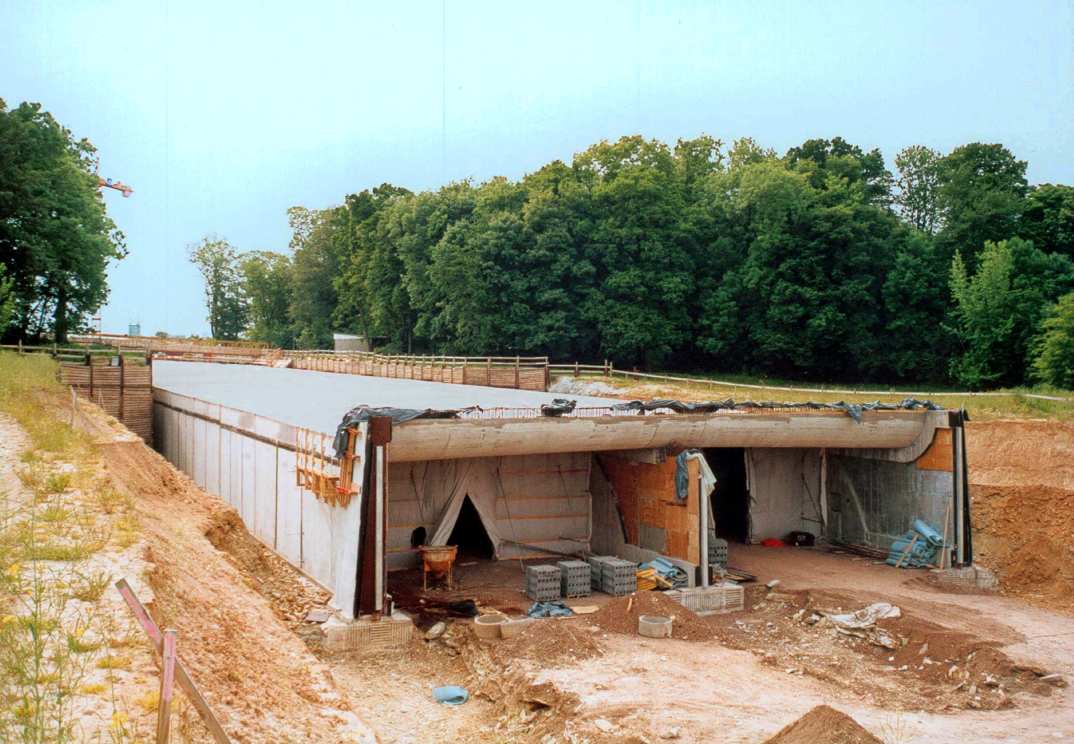 27.05.2001 01156 Dresden-Altfranken: Autobahn A17 nach Prag. Bau der Grünbrücke (GMP: 51.035619,13.646947), die den Schloßpark Altfanken und die Otto-Harzer-Straße unterquert. Stadtseitiger Tunnelmund. [F20010519A22.jpg]20010527600AR.JPG(c)Blobelt